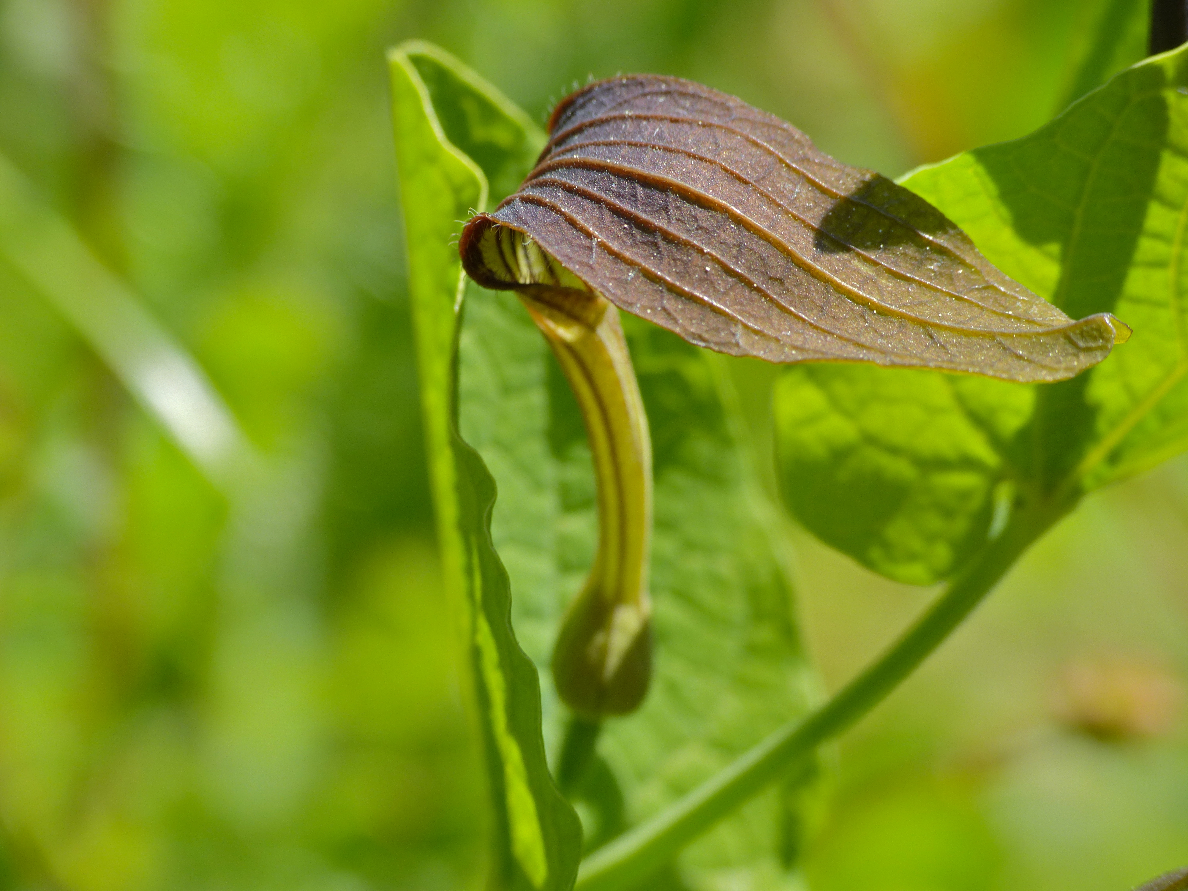 Ceilhes-et-Rocozels, Hérault, FRANCE